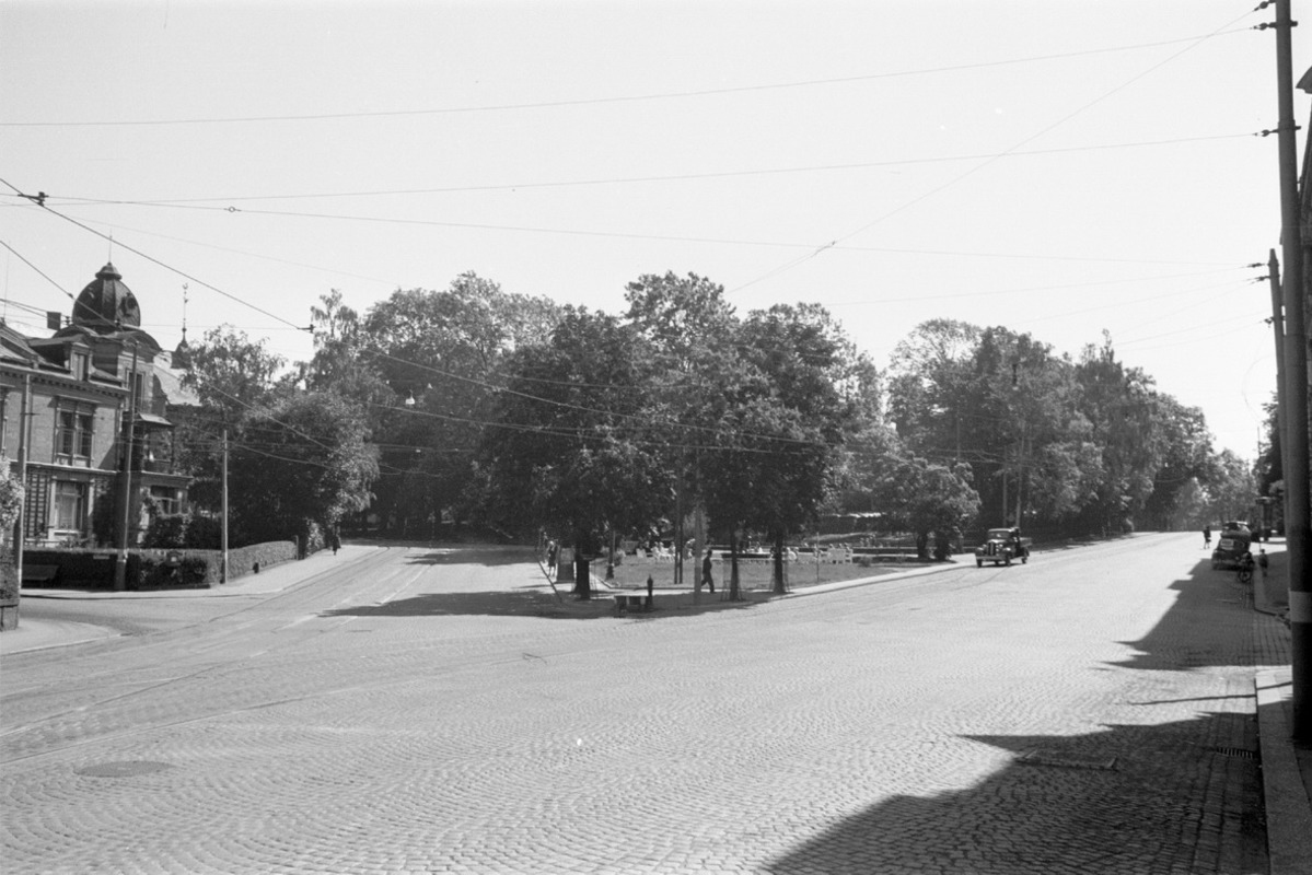 Krysset Drammensveien - Munkedamsveien på Skillebekk, ca. 1944